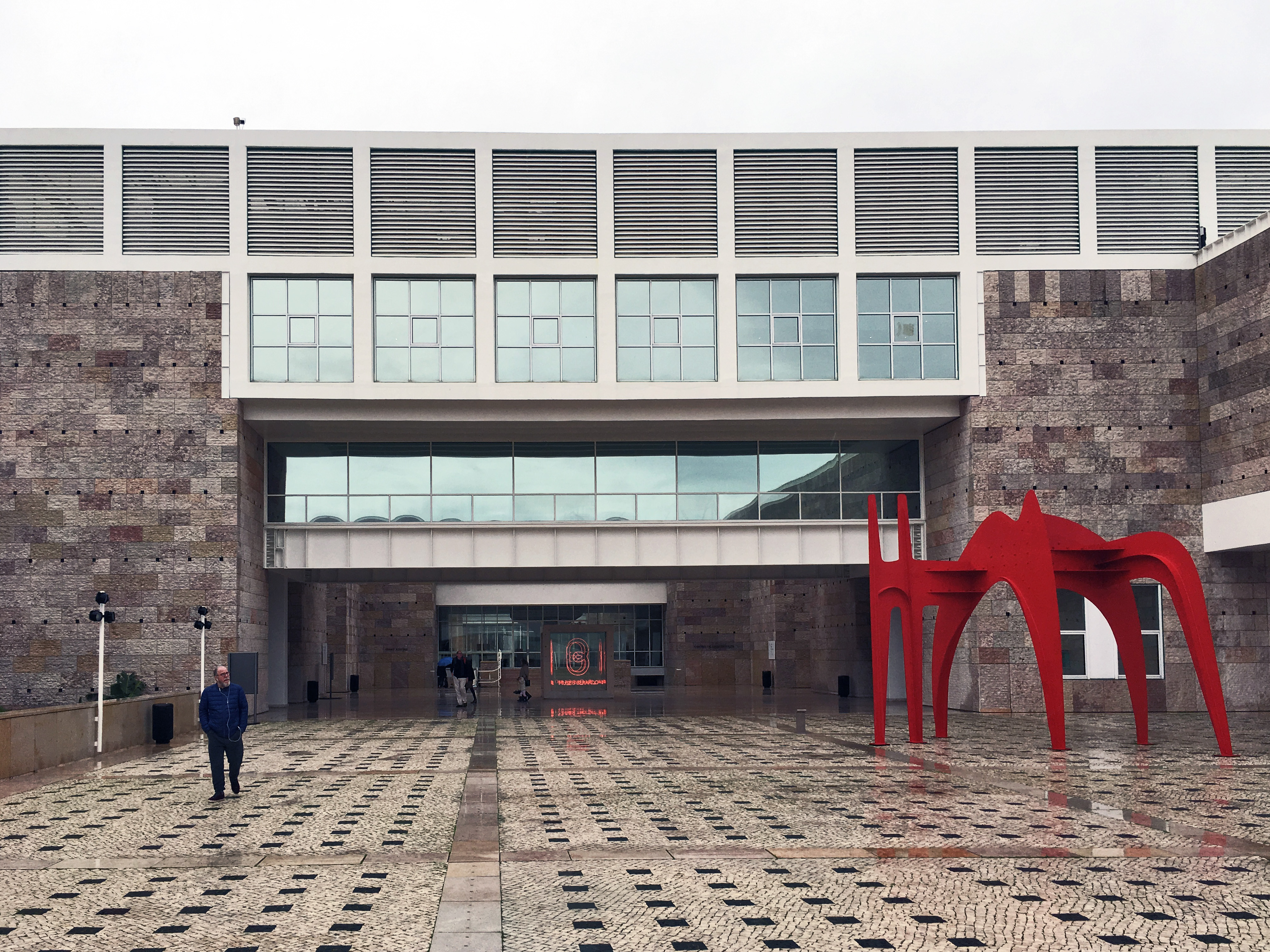 manuel salgado e vittorio gregotti, centro cultural de belém (1988–1992) lisboa, portugal, janeiro de 2018